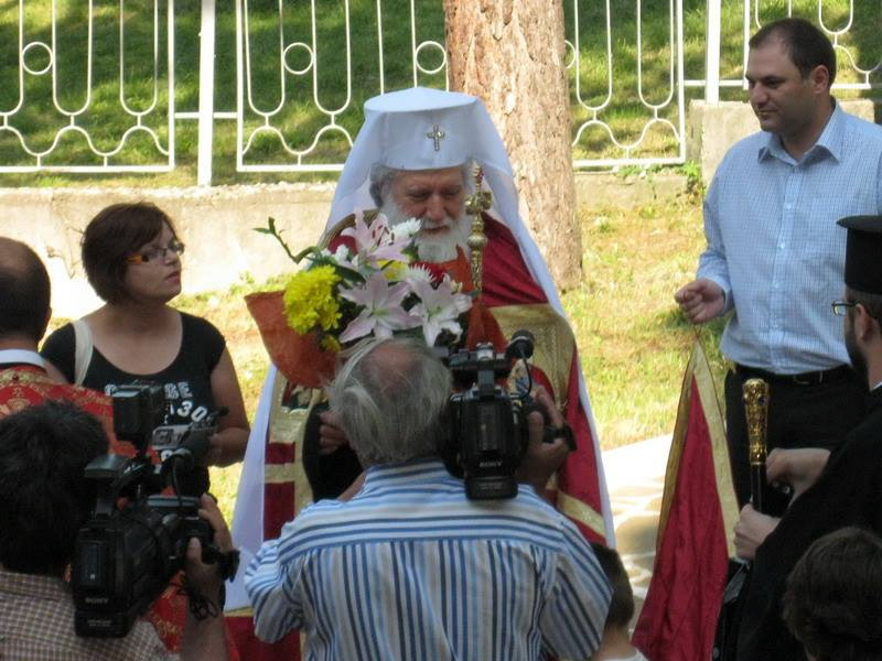 Българският патриарх Неофит на посещение в Попово на Петровден 2013 г.